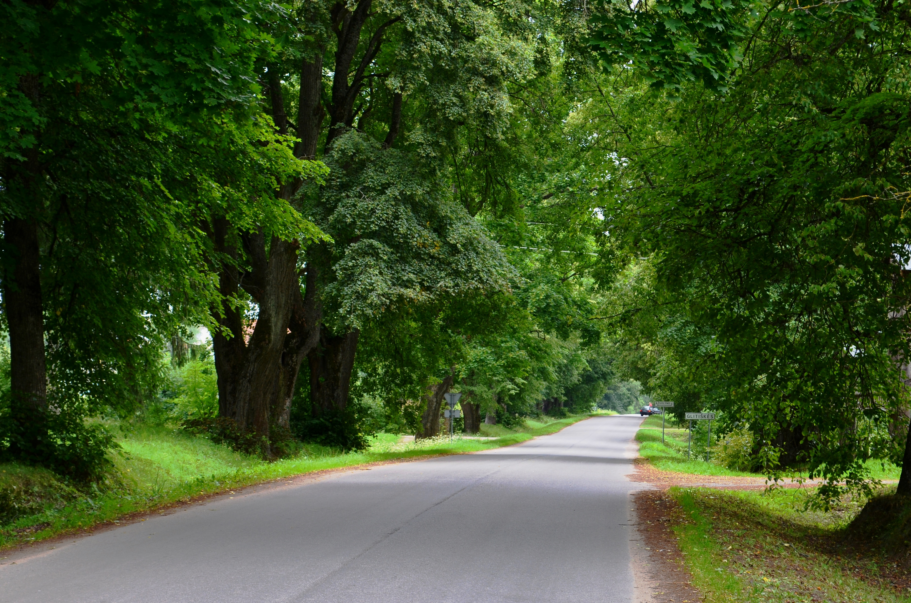 Glitiškių medžių alėja, Vilniaus r.